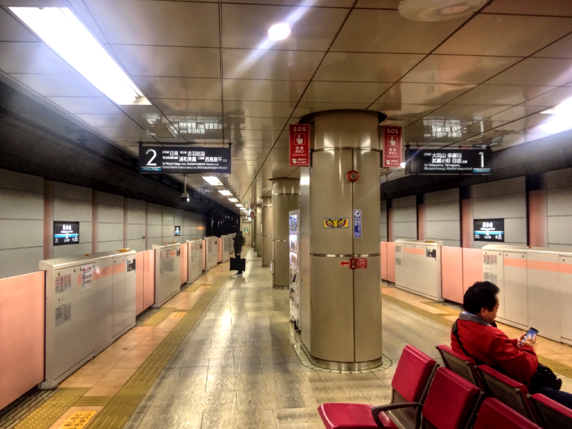 西小山駅のホーム (nishi-koyama station platforms)